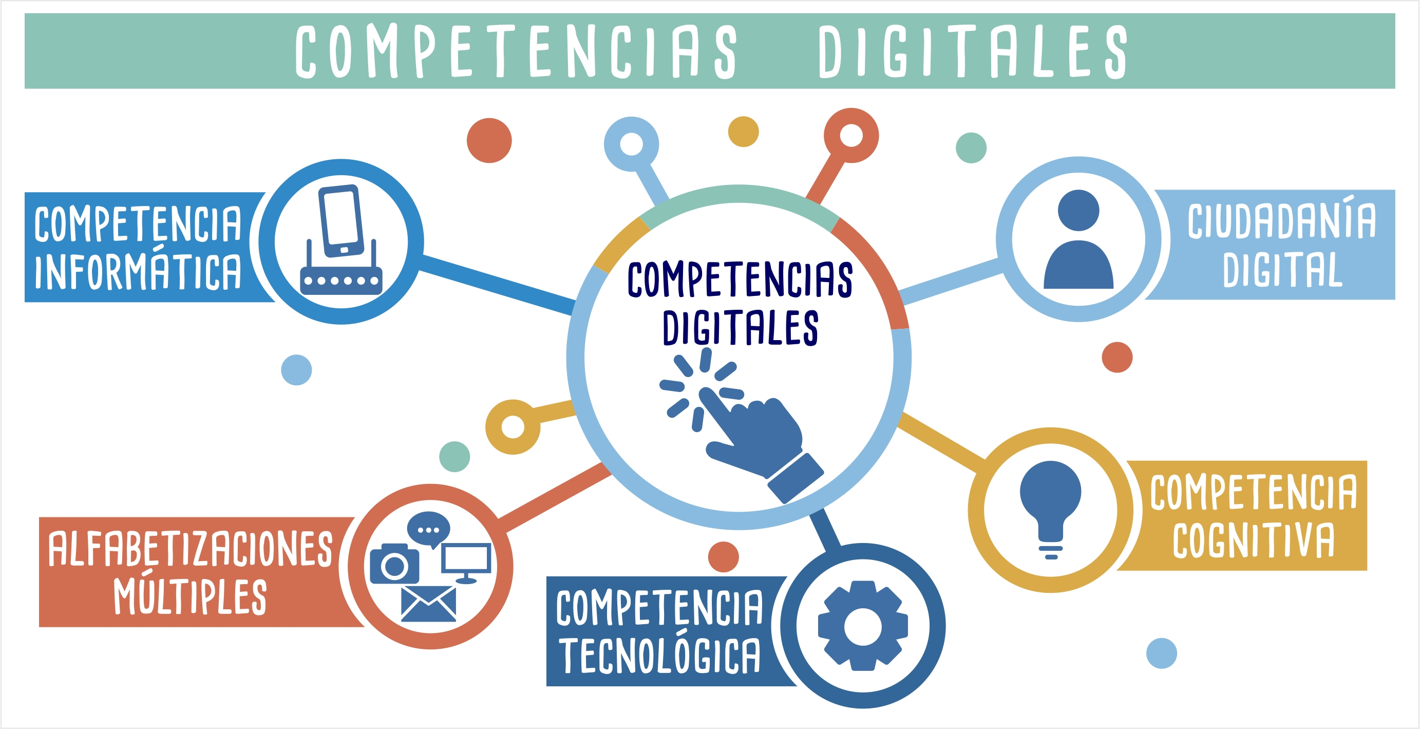 Las Competencias digitales son aquellas que facilitan el uso de los dispositivos digitales, las aplicaciones de la comunicación y las redes para acceder a la información y llevar a cabo una mejor gestión de éstas.